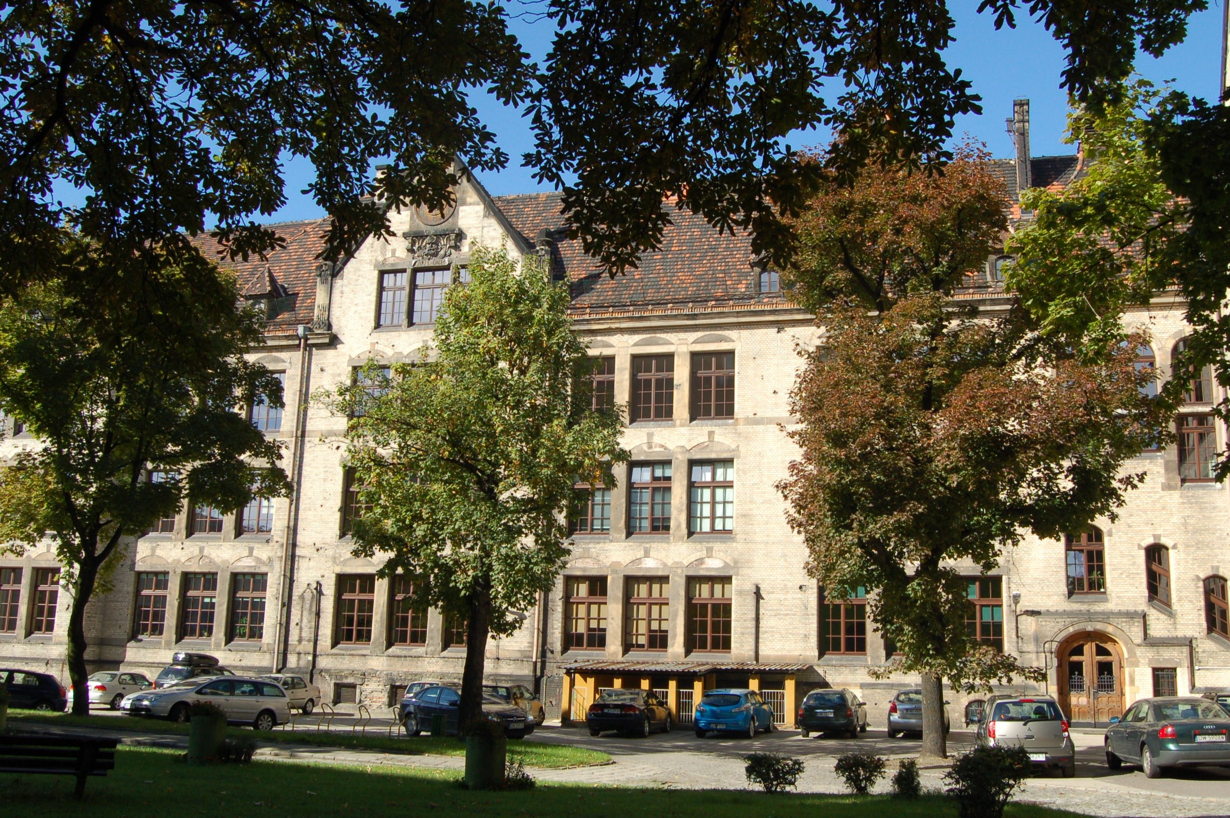 budynki Instytutu Pedagogiki i Psychologii Uniwersytetu Wrocławskiego, dawniej Zespół Gimnazjum św. Elżbiety:- budynek główny Instytutu Pedagogiki i Psychologii Uwr. Dawida 1, Miasto Wrocław - Krzyki